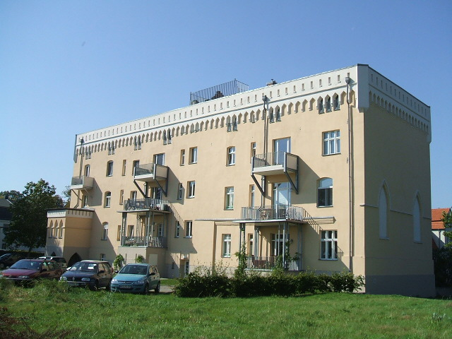 Stralsund, Germany. Das Foto zeigt die Rückseite des Schlosses am Sund.